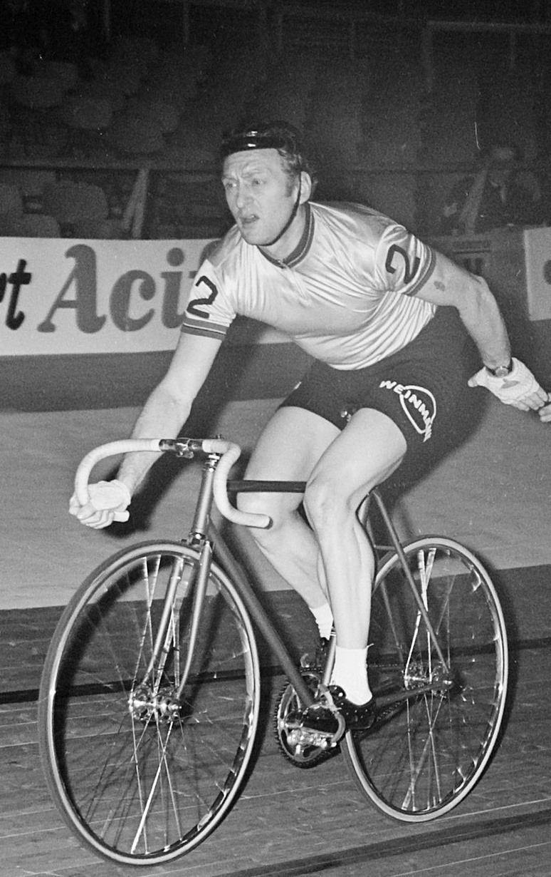 Zesdaagse wielrennen in RAI Amsterdam. Klaus Bugdahl